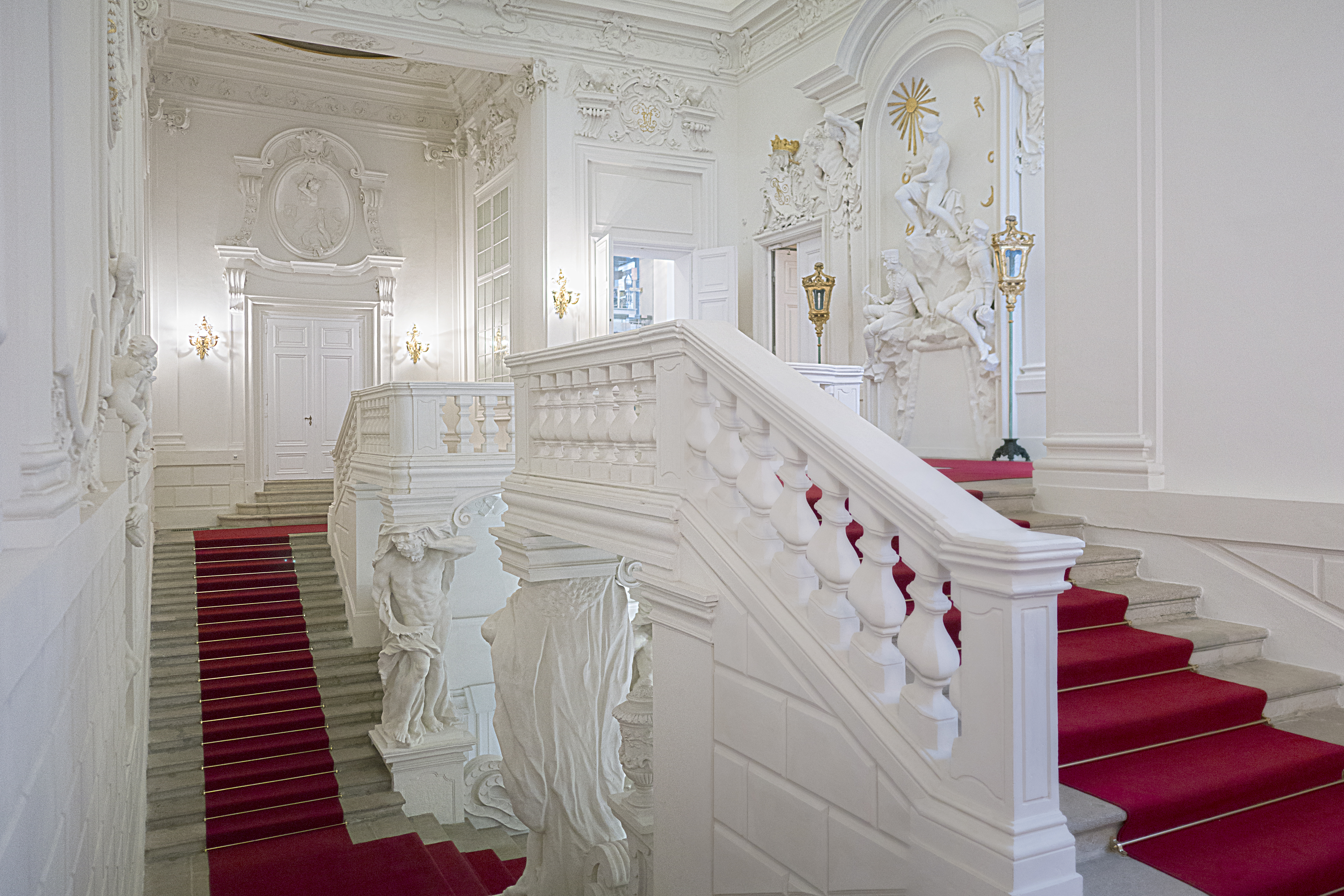 Ehem. Stadtpalais des Prinzen Eugen, BM für Finanzen